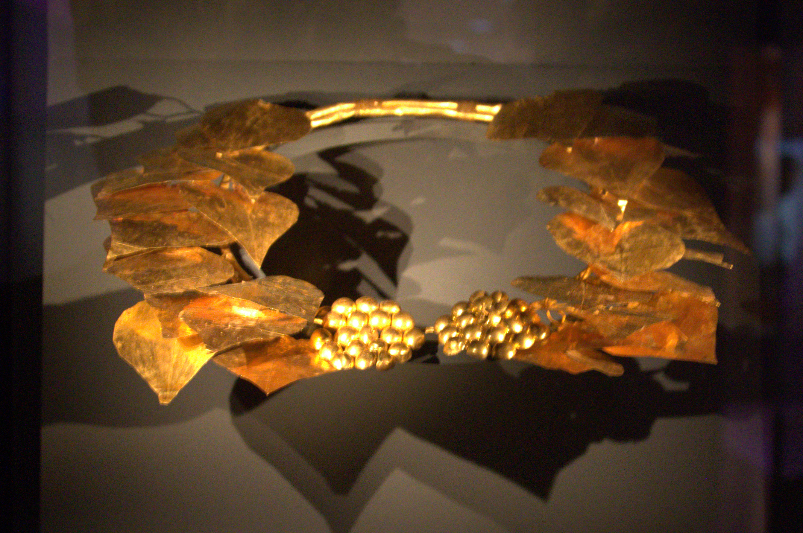 Archaeological Museum of Thessaloniki, Greece. --- Χρυσό στεφγάνι κισσού. Μέσα 4ου αι. π.Χ. Αρχαιολογικό Μουσείο Θεσσαλονίκης.